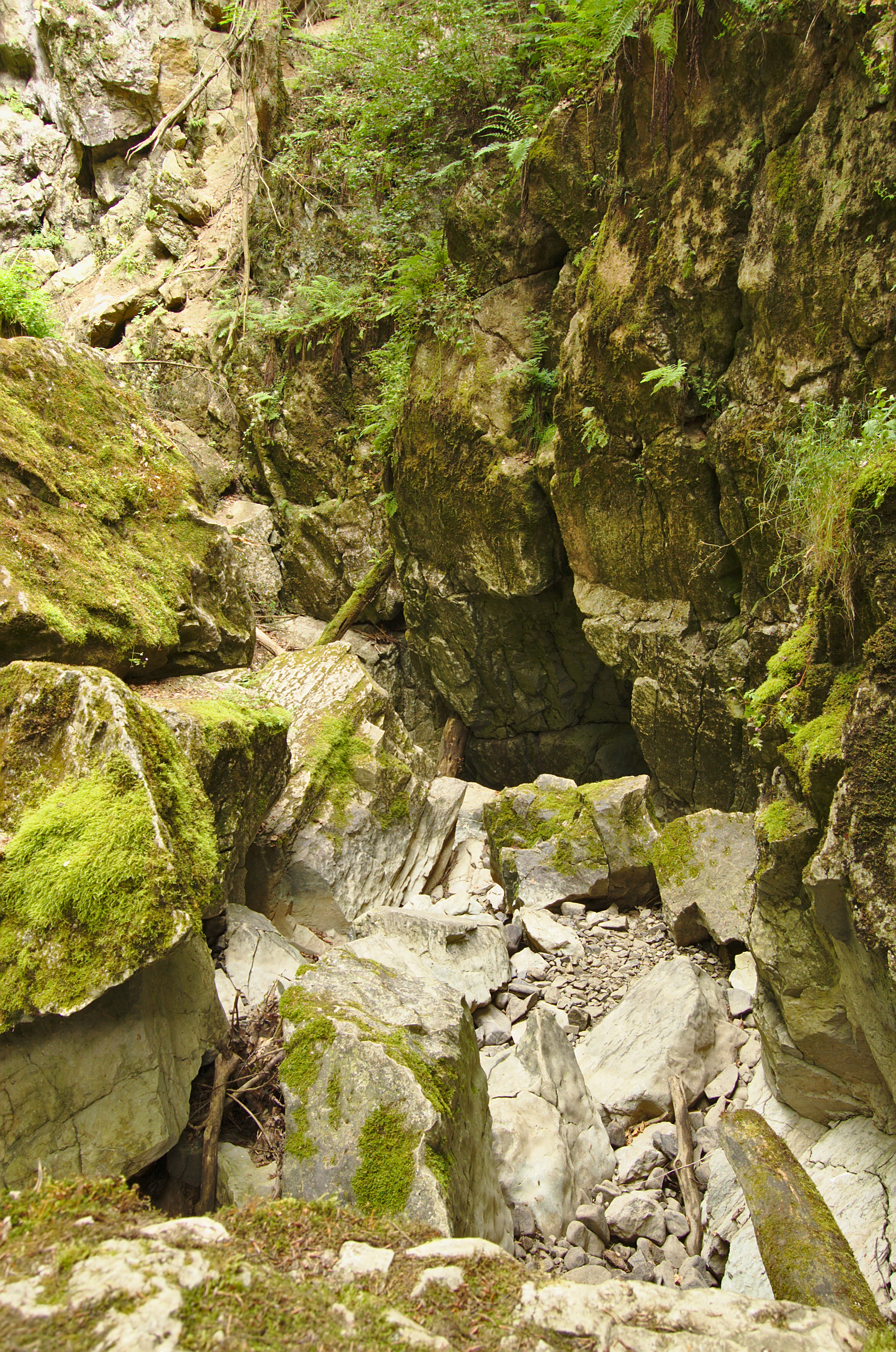 Nová rasovna, Holštejn, okres Blansko